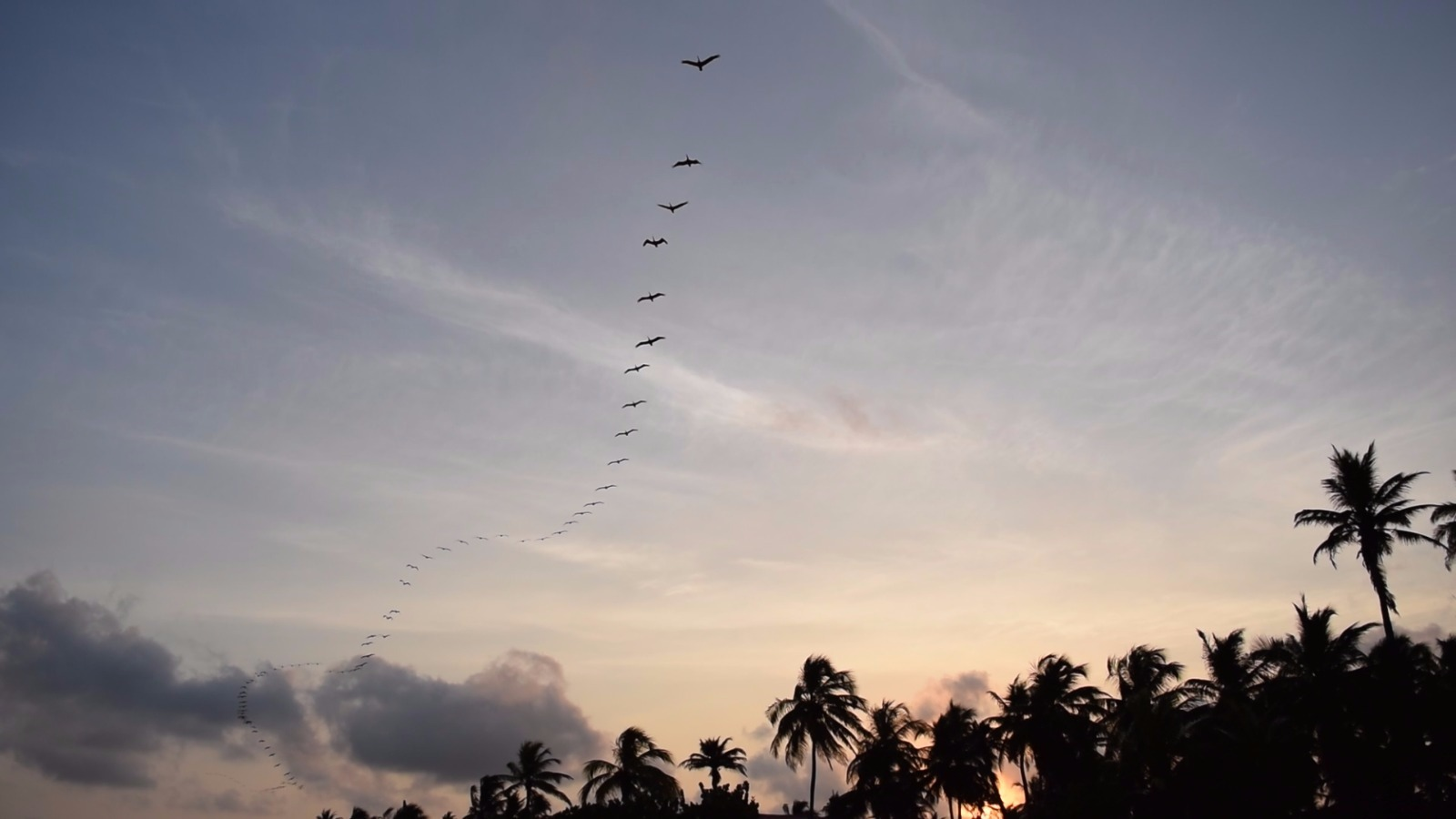 Esta fotografía fue tomada en el municipio colombiano con código 23675.